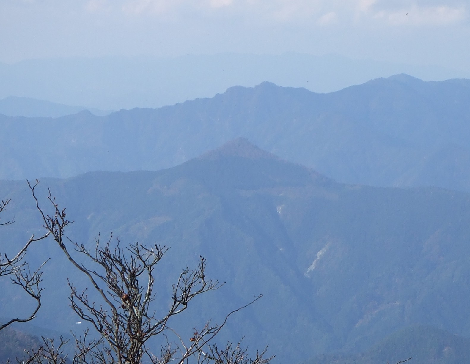 真ん中のピラミたるな山です